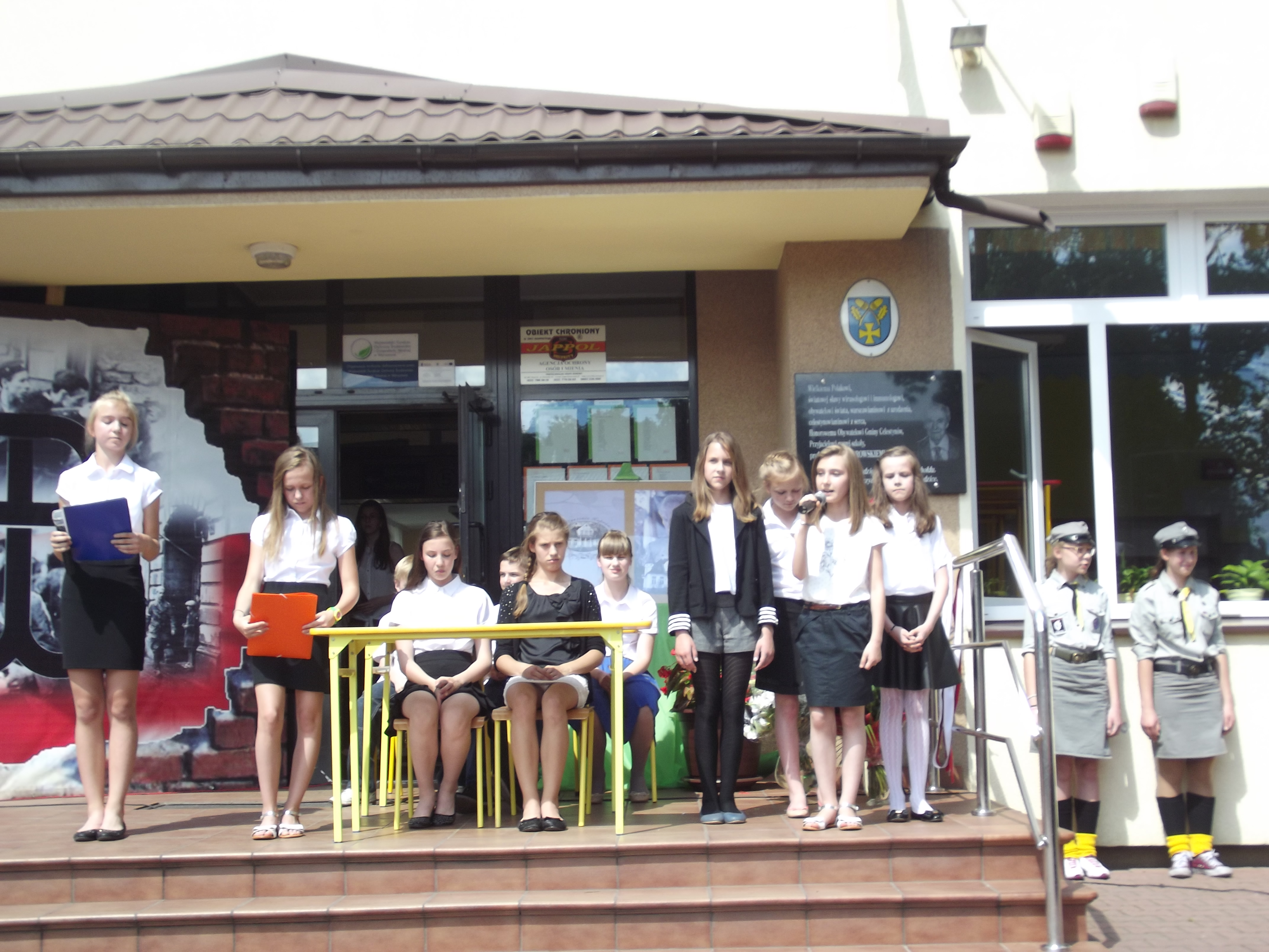 Występ uczniów podczas uroczystości upamiętniających profesora Hilarego Koprowskiego przed szkołą w Celestynowie